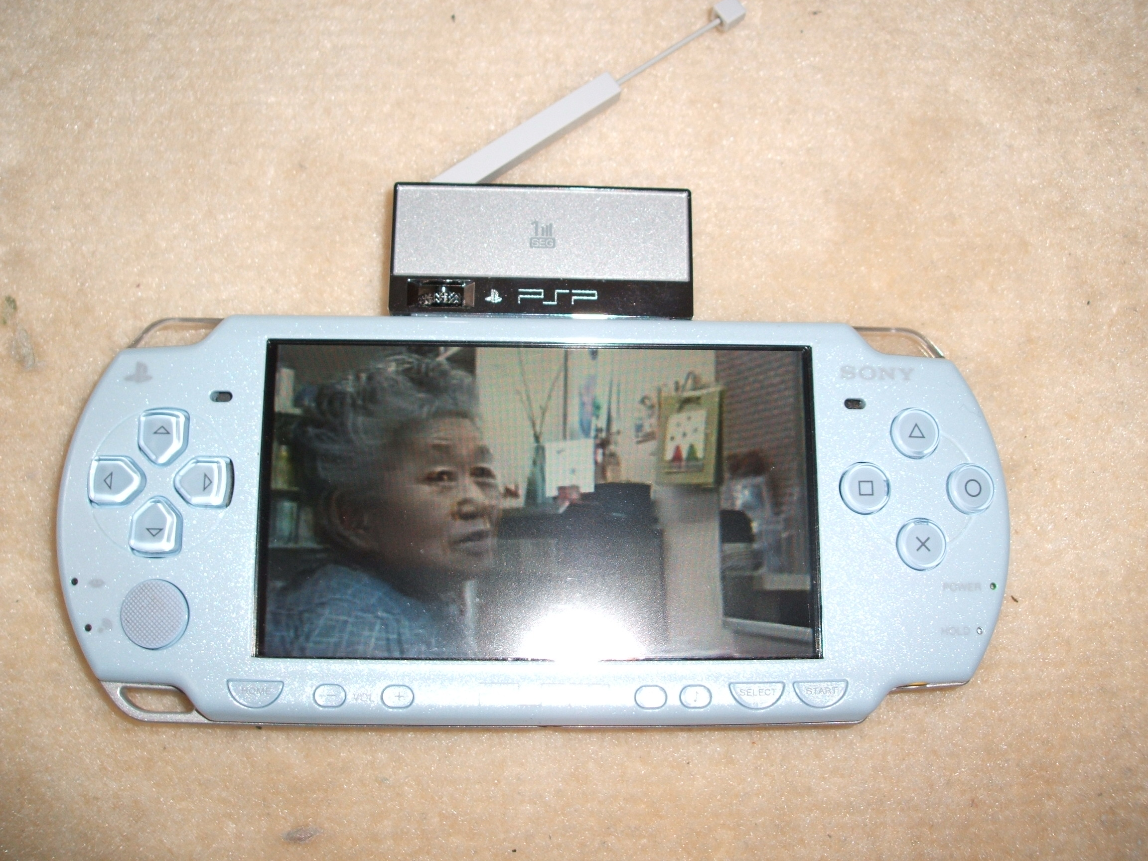 PSP Slim 1SEG